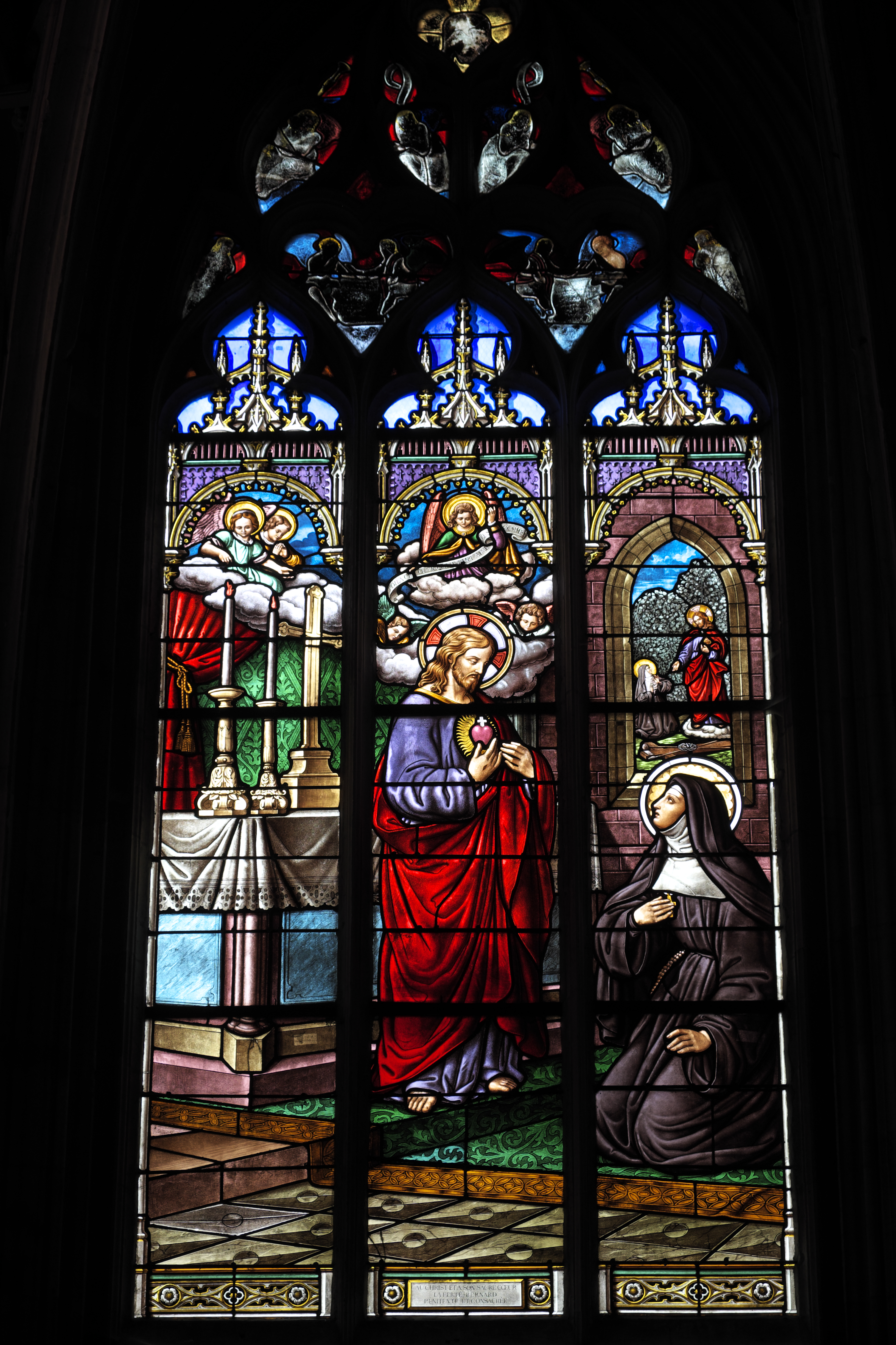 Katholische Pfarrkirche Notre-Dame-des-Marais in La Ferté-Bernard im Département Sarthe (Pays de la Loire/Frankreich), Bleiglasfenster (baie 7) mit Fragmenten um 1530-1540 im Maßwerk, Lanzetten aus der zweiten Hälfte des 19. Jahrhunderts von Eugène Hucher, aus der Glasmalereiwerkstatt der Karmeliten von Le Mans (Carmel du Mans); Darstellung: Erscheinung des Herzen Jesu der Marguerite Marie Alacoque